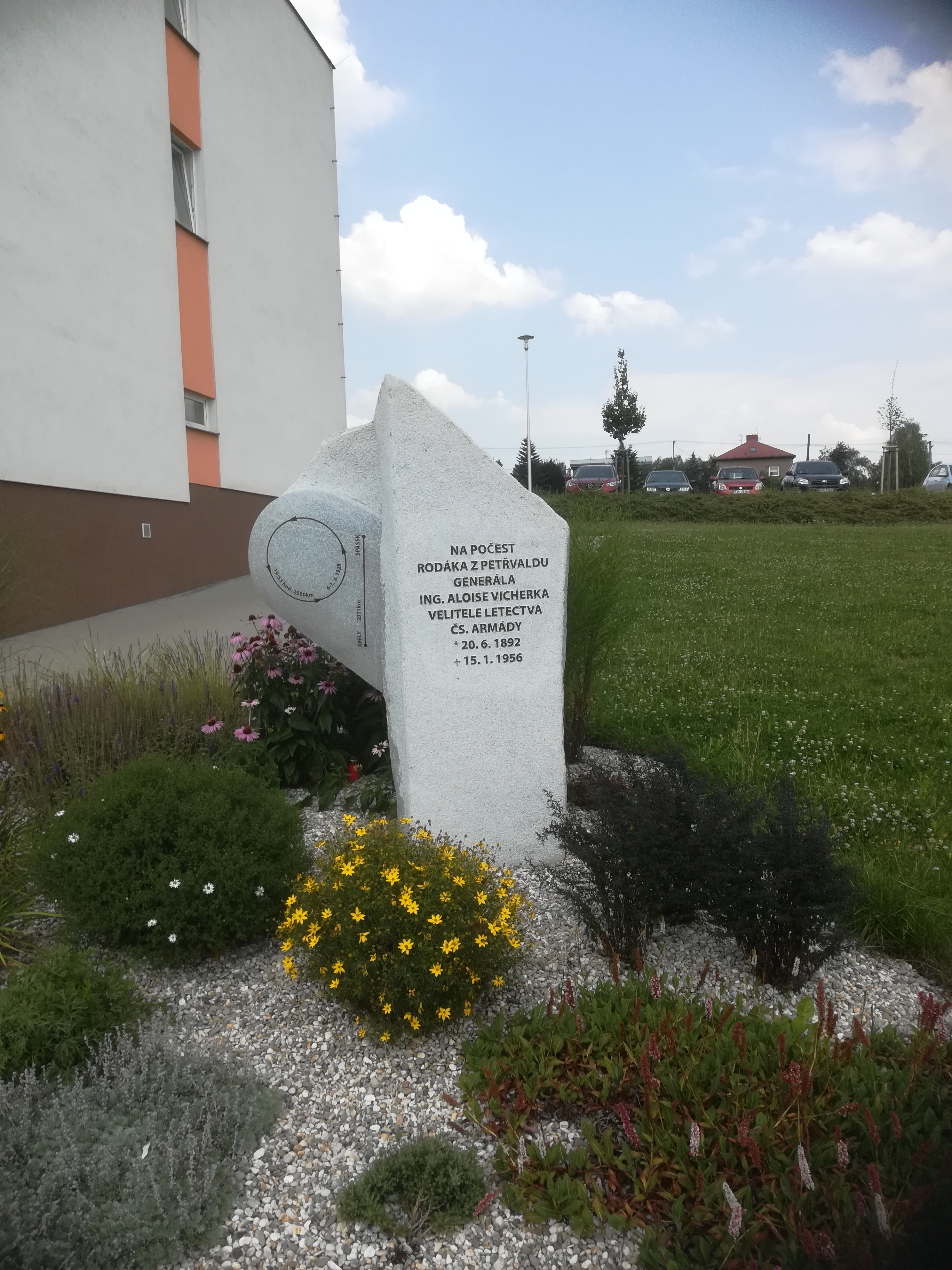 Památník Aloisovi Vicherkovi u MěÚ v Petřvaldě u Karviné